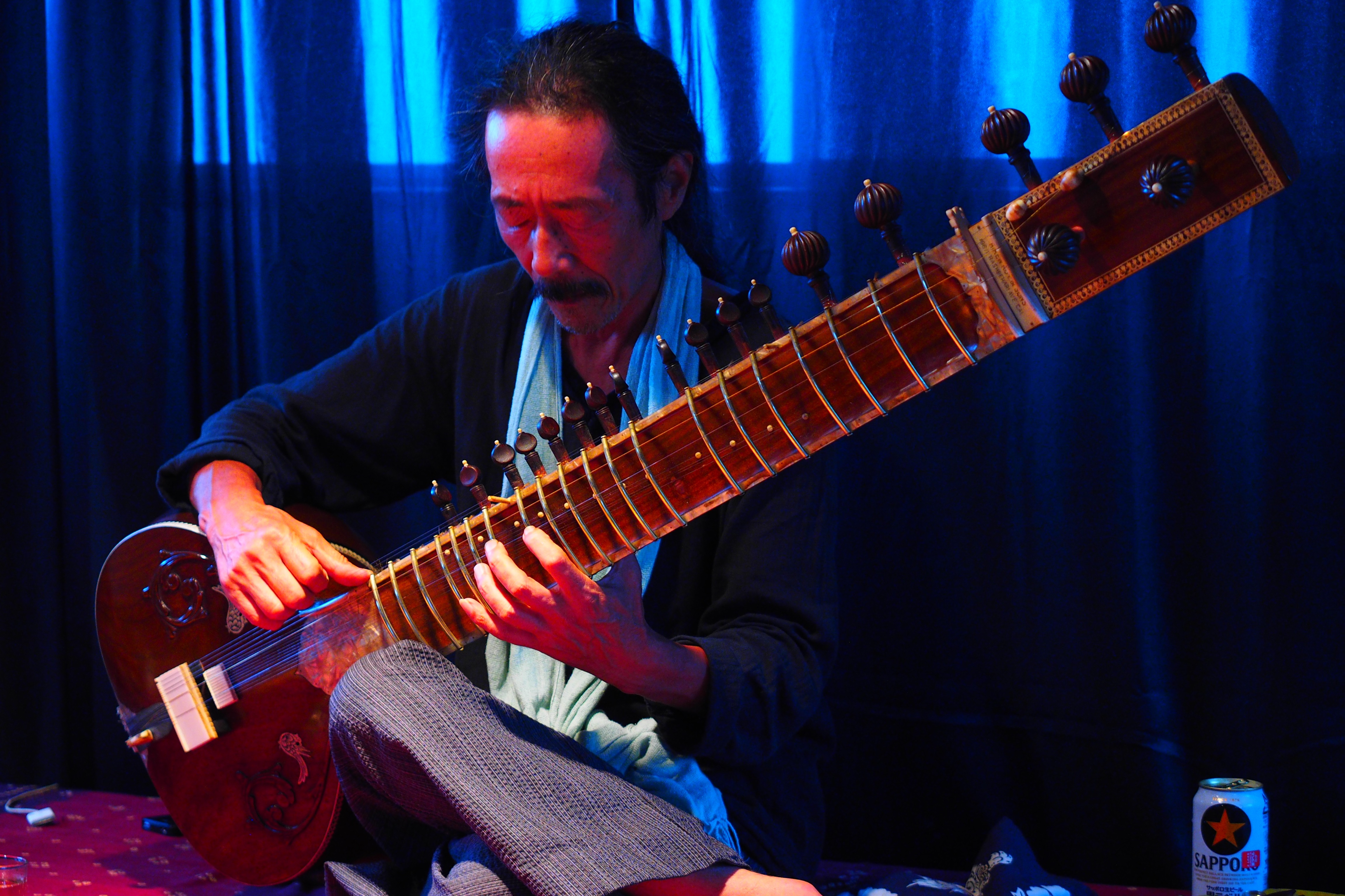 シタール奏者伊藤公朗